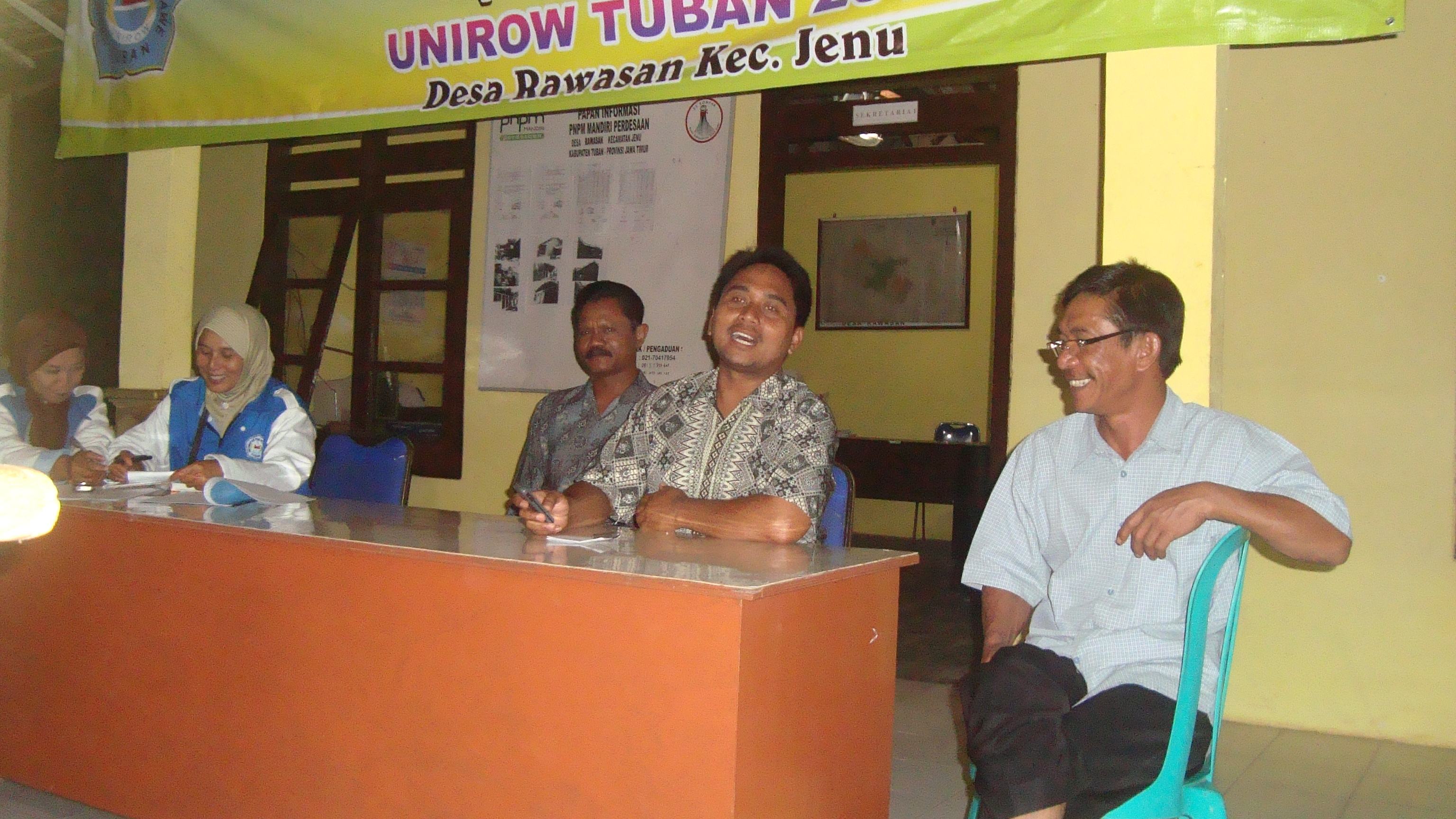 Kegiatan Pemerintahan